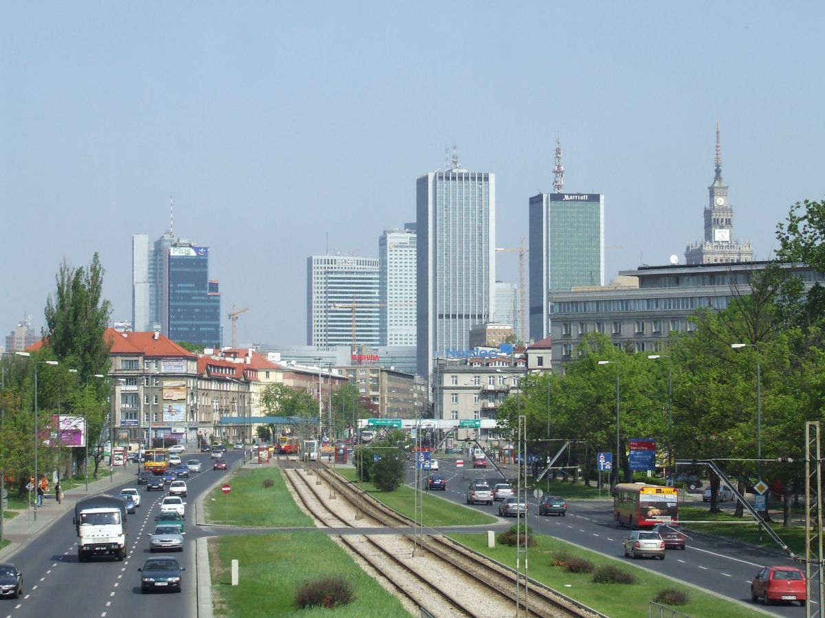 Aleja Niepodległości w Warszawie, Warszawa, Poland